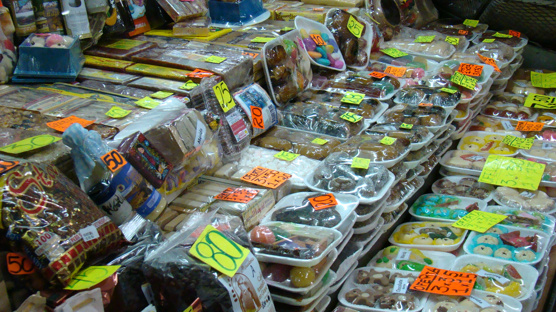 Dulces andinos y de otras regiones en el Mercado Principal de Mérida. Mérida.